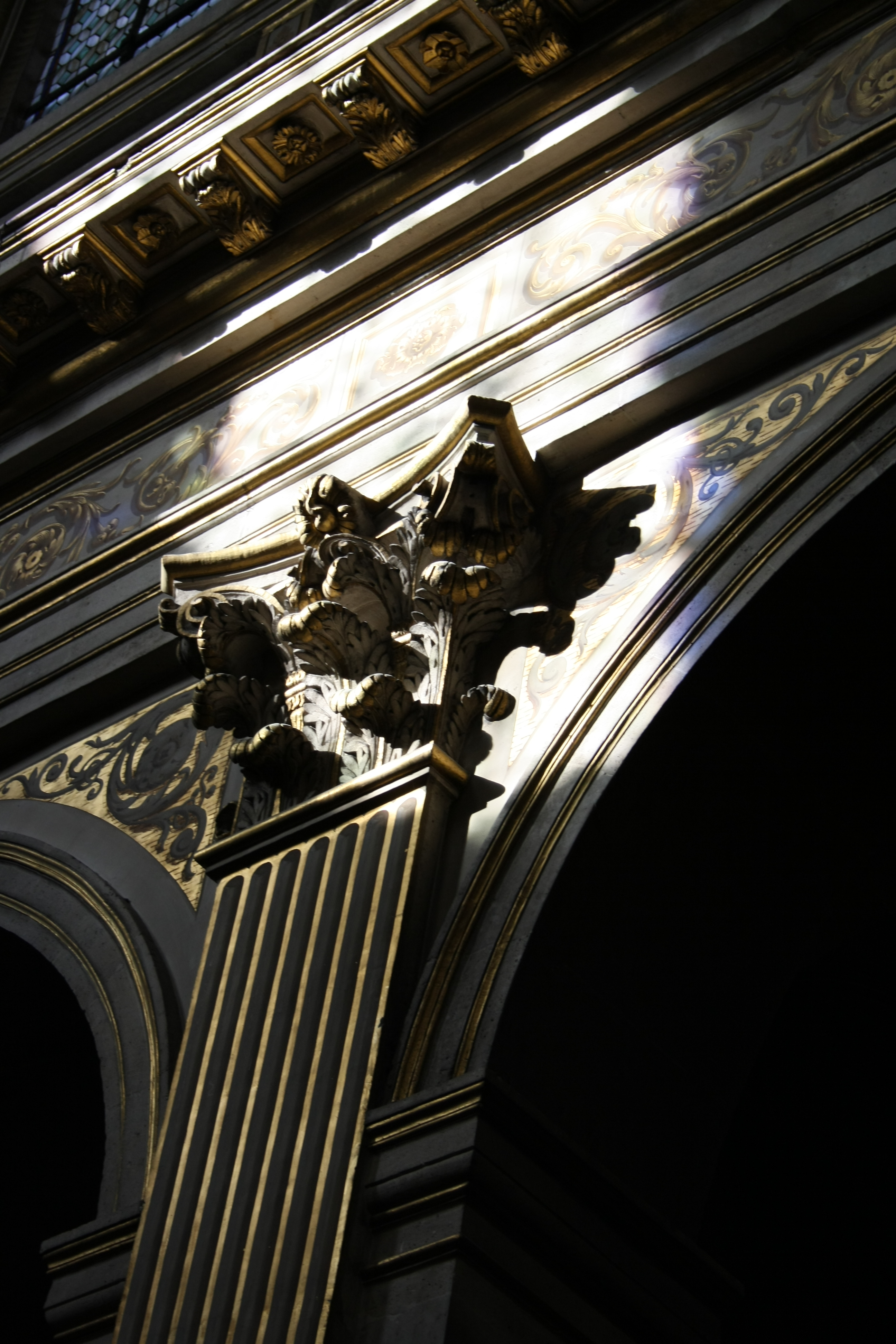 Katholische Pfarrkirche Saint-Louis-en-l'Île auf der Île Saint-Louis im 4. Arrondissement von Paris, Pilasterkapitell